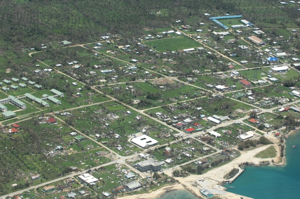 Cyclone Ian